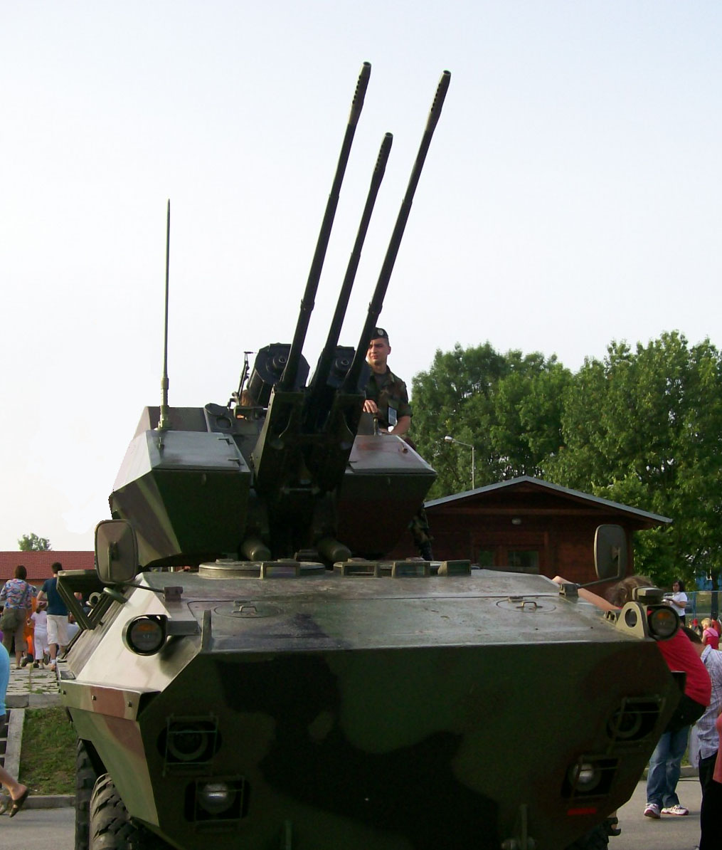 Samovozni protuzrakoplovni top 20/3mm